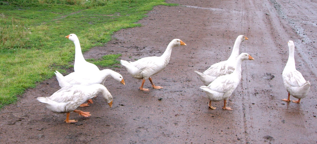 Гуси на деревнской улице